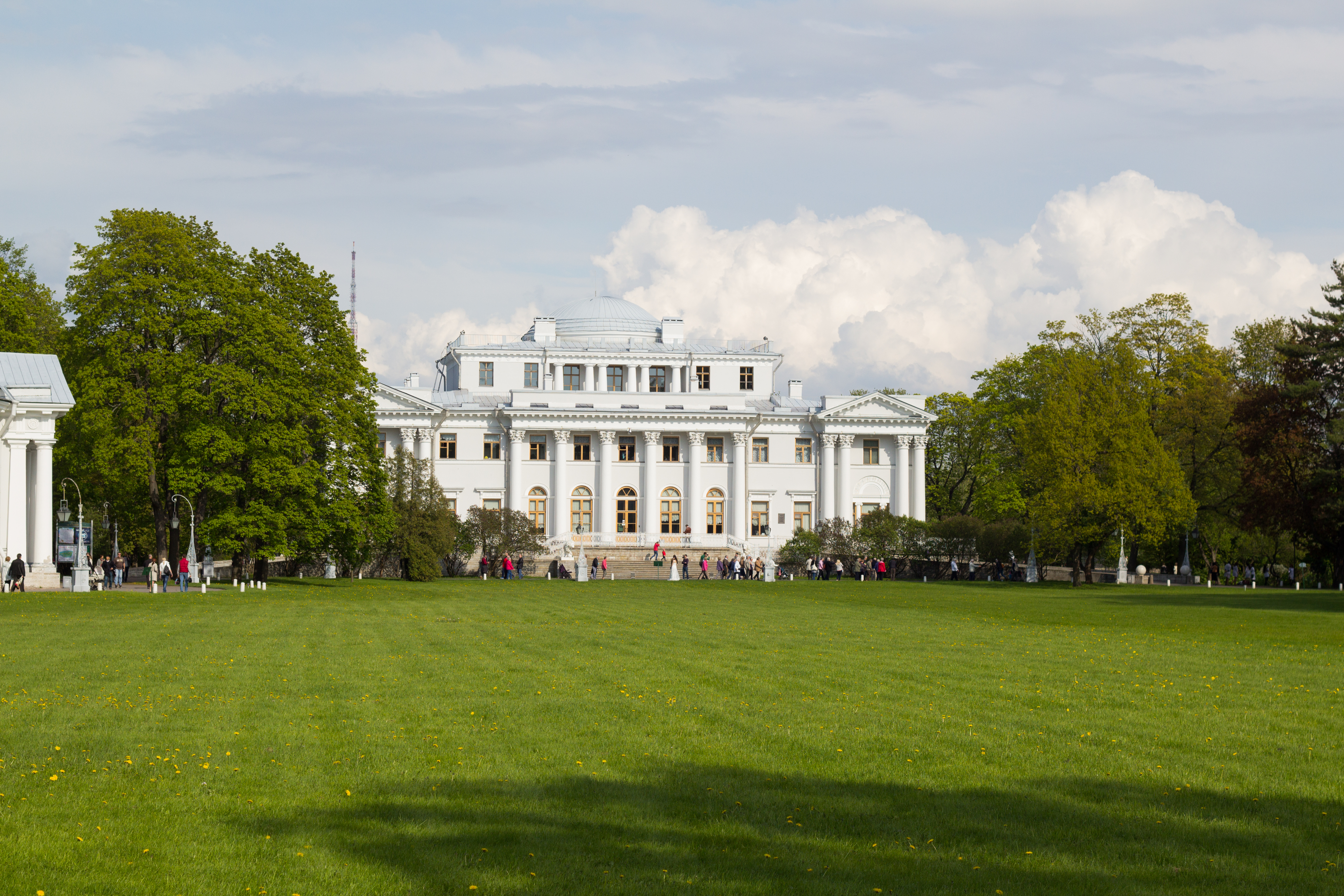 Елагин остров, Петроградский район This image is related to the protected area of Russia number 7810011